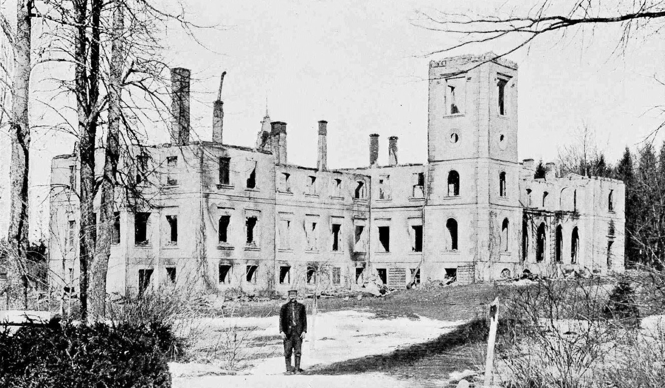 Stāmeriena mõisa peahoone pärast 1905. aasta põlengut